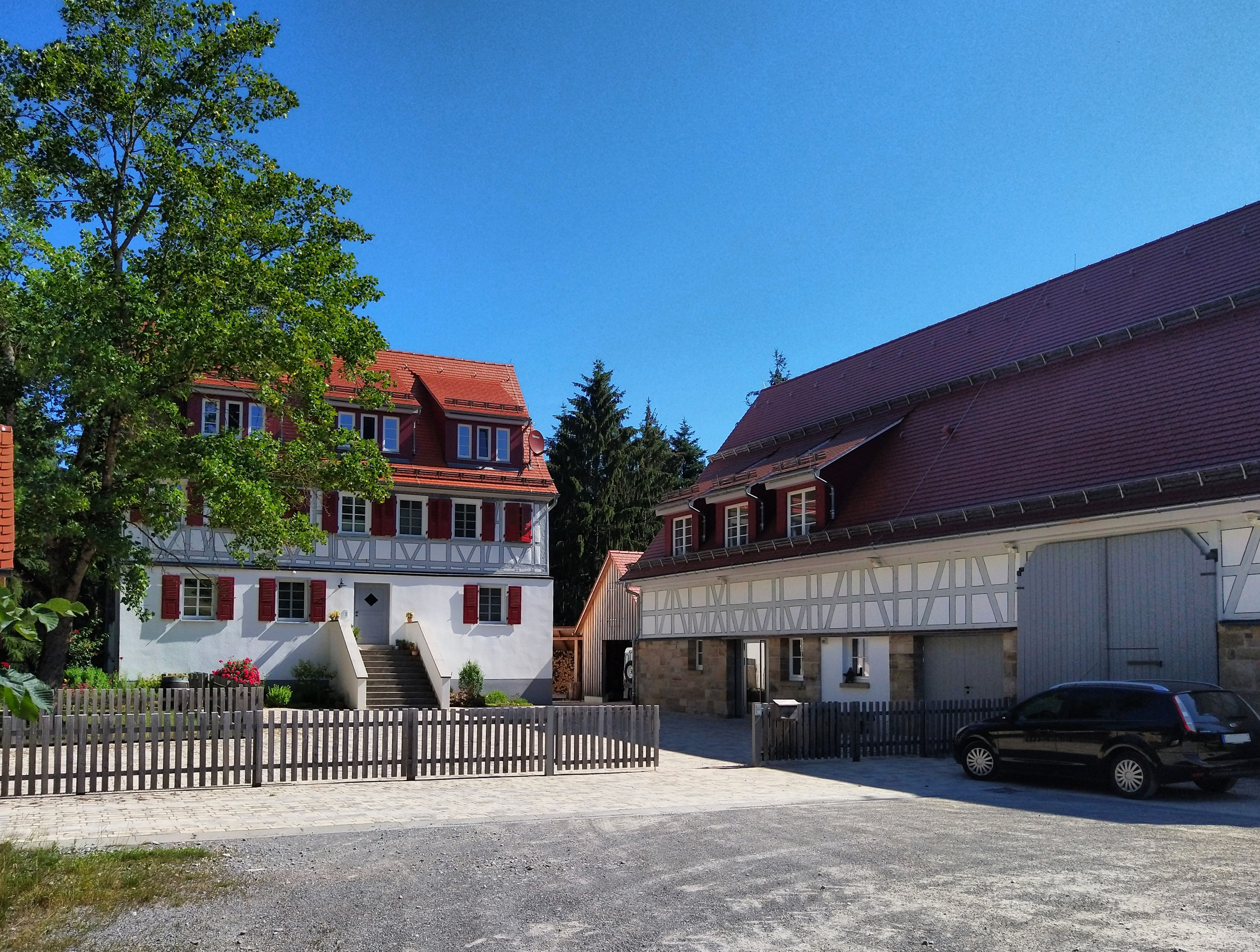 Warthof (Aspach)